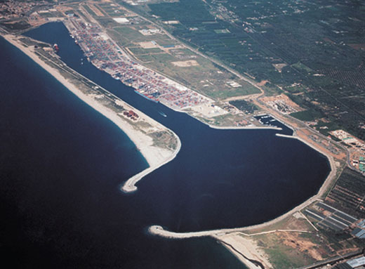 Gioia Tauro kikötője